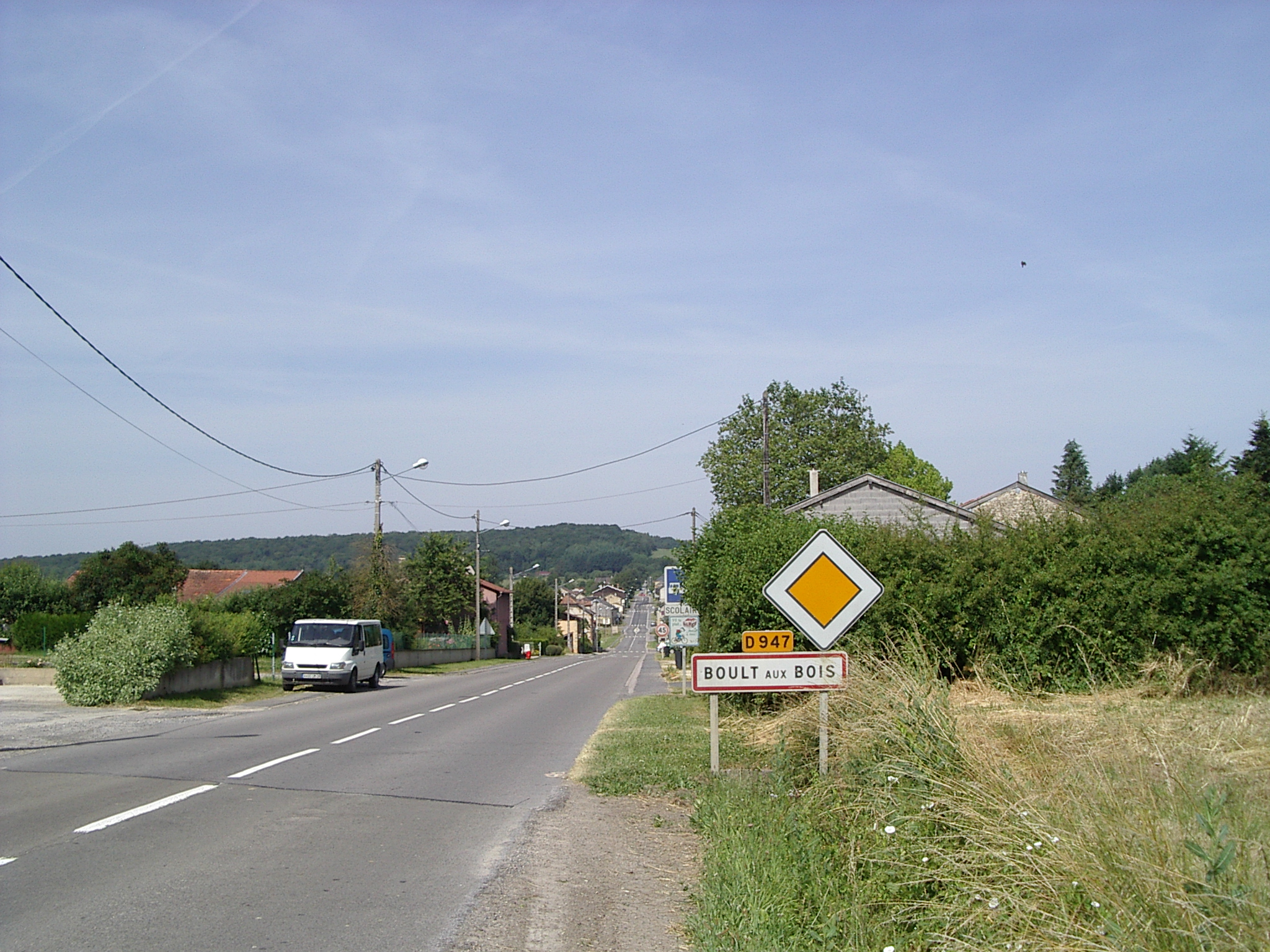 Boult-aux-Bois est une commune française, située dans le département des Ardennes et la région Champagne-Ardenne.